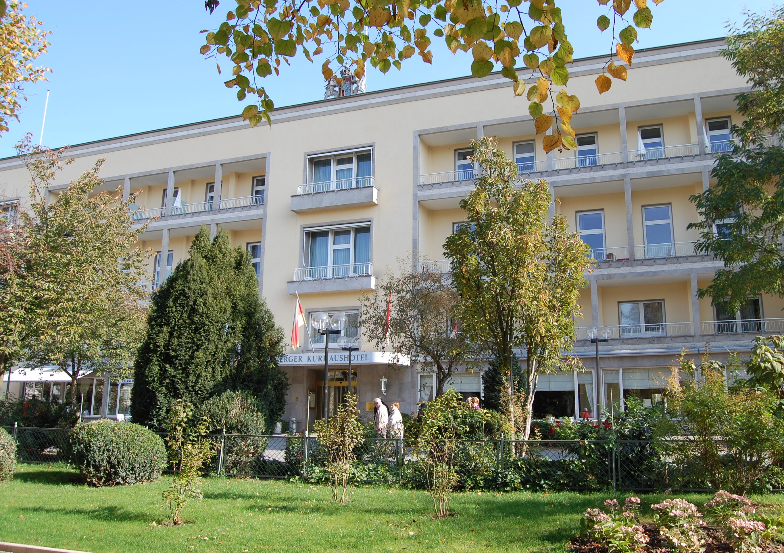 Steigenberger Hotel Bad Kissingen, früher Königliches Kurhaushotel